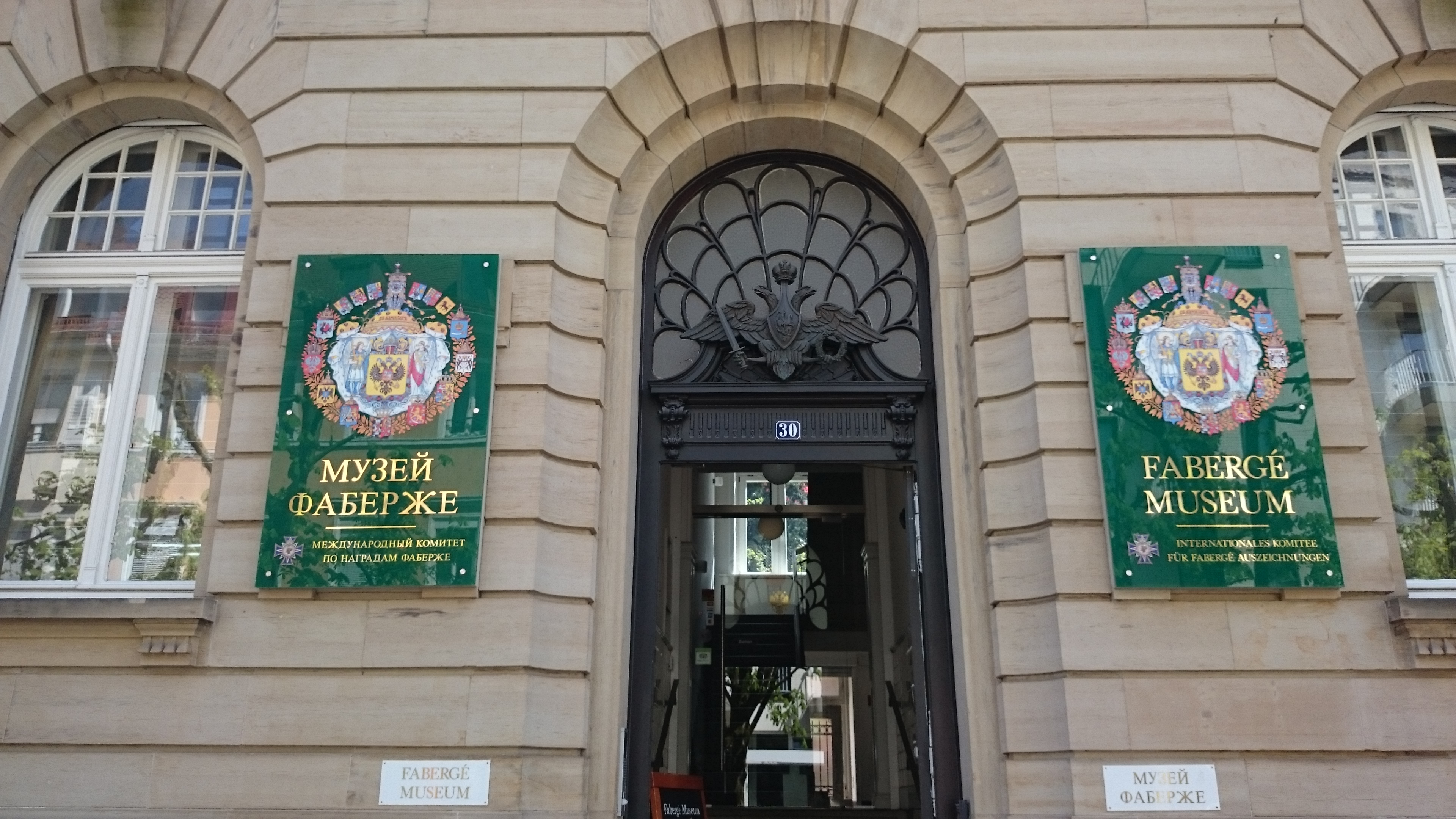 Baden-Baden